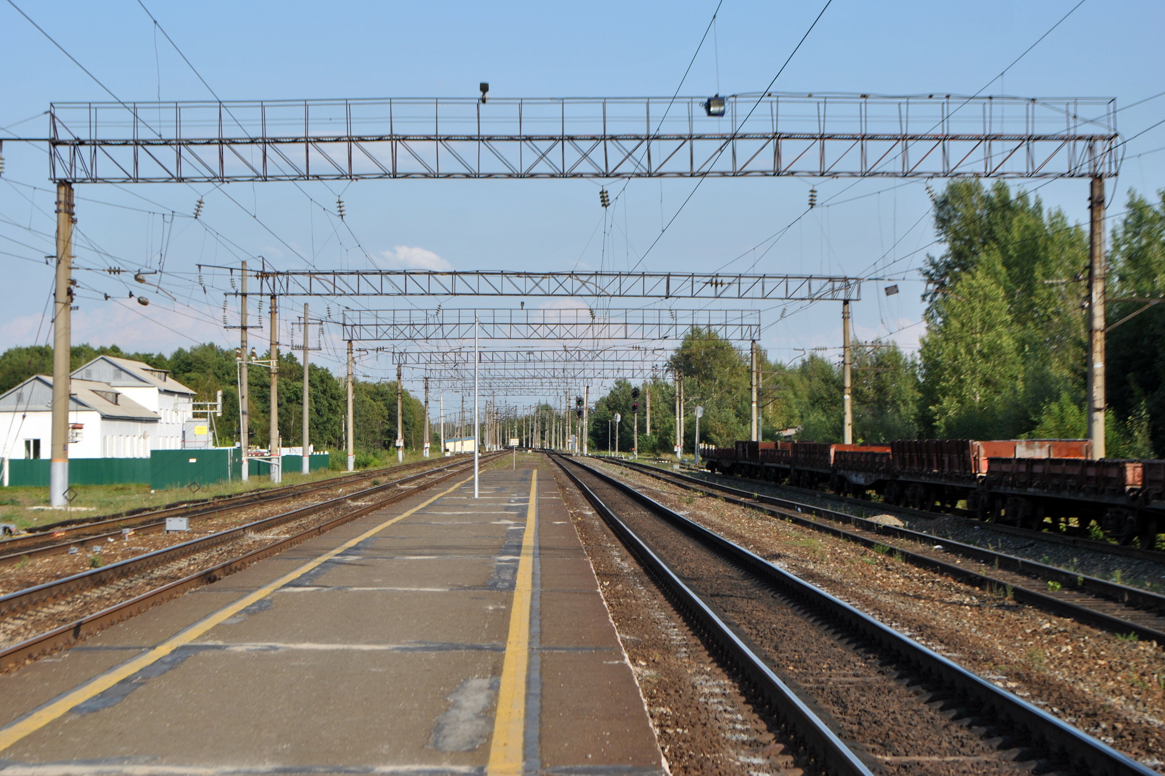 Станция Камбарка в чётном направлении